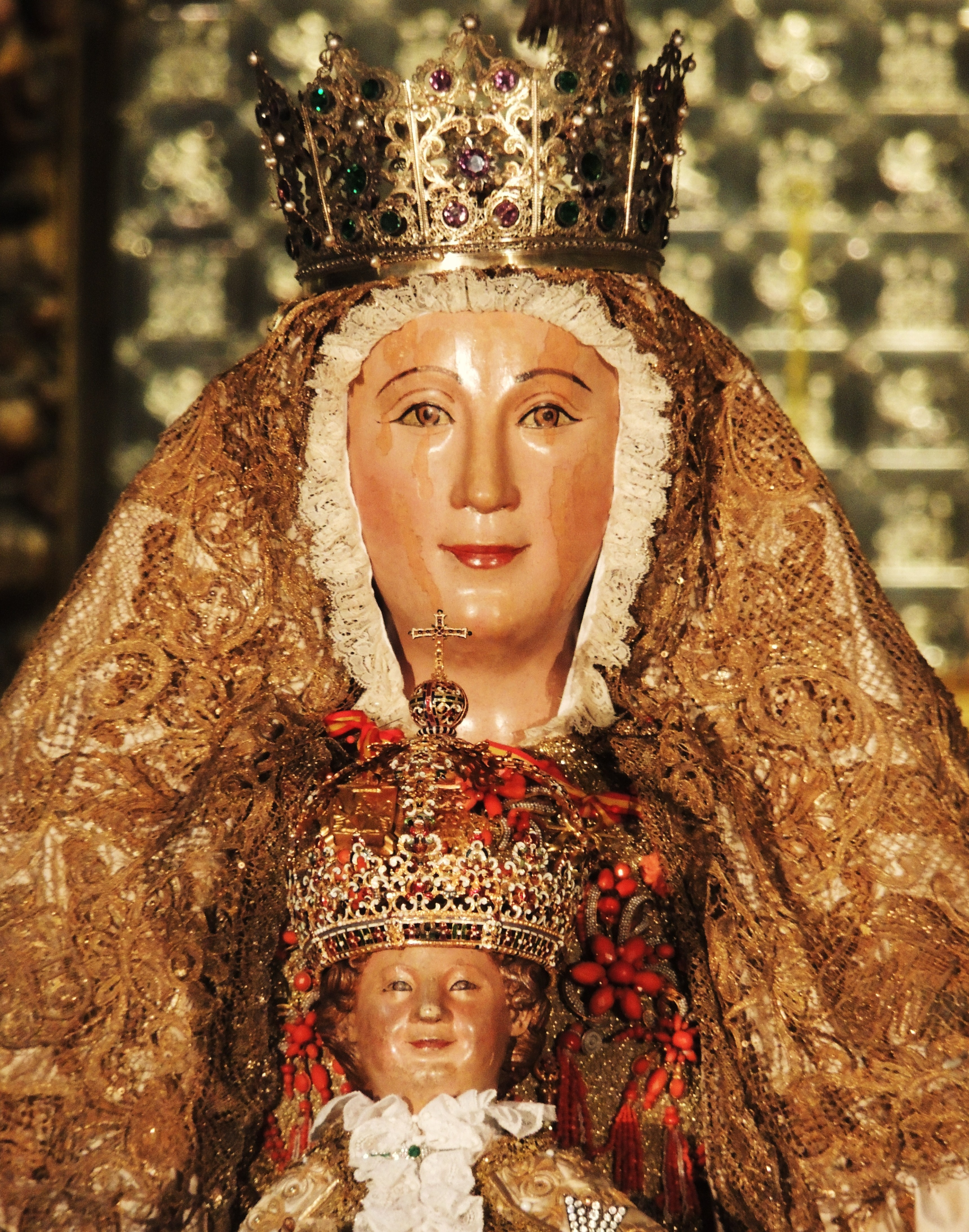 La Virgen de los Reyes, en la Capilla Real de la catedral de Sevilla, (España).